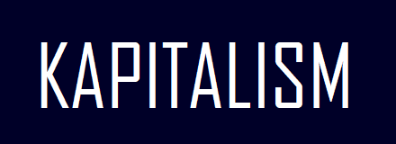 Kapitalism on valitseb tänapäeval pea kõikides riikides.